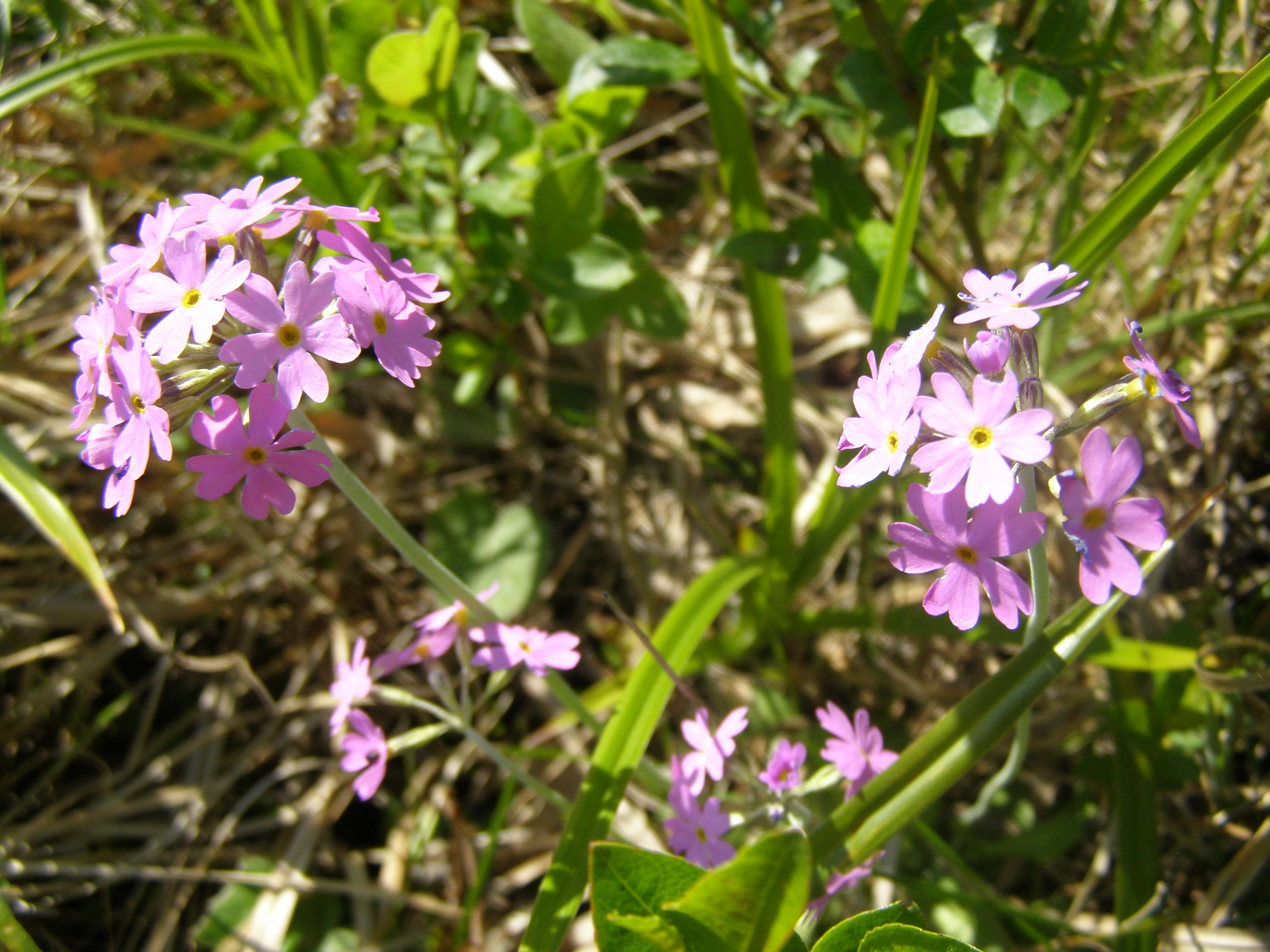 Pääsusilm (Primula farinosa)